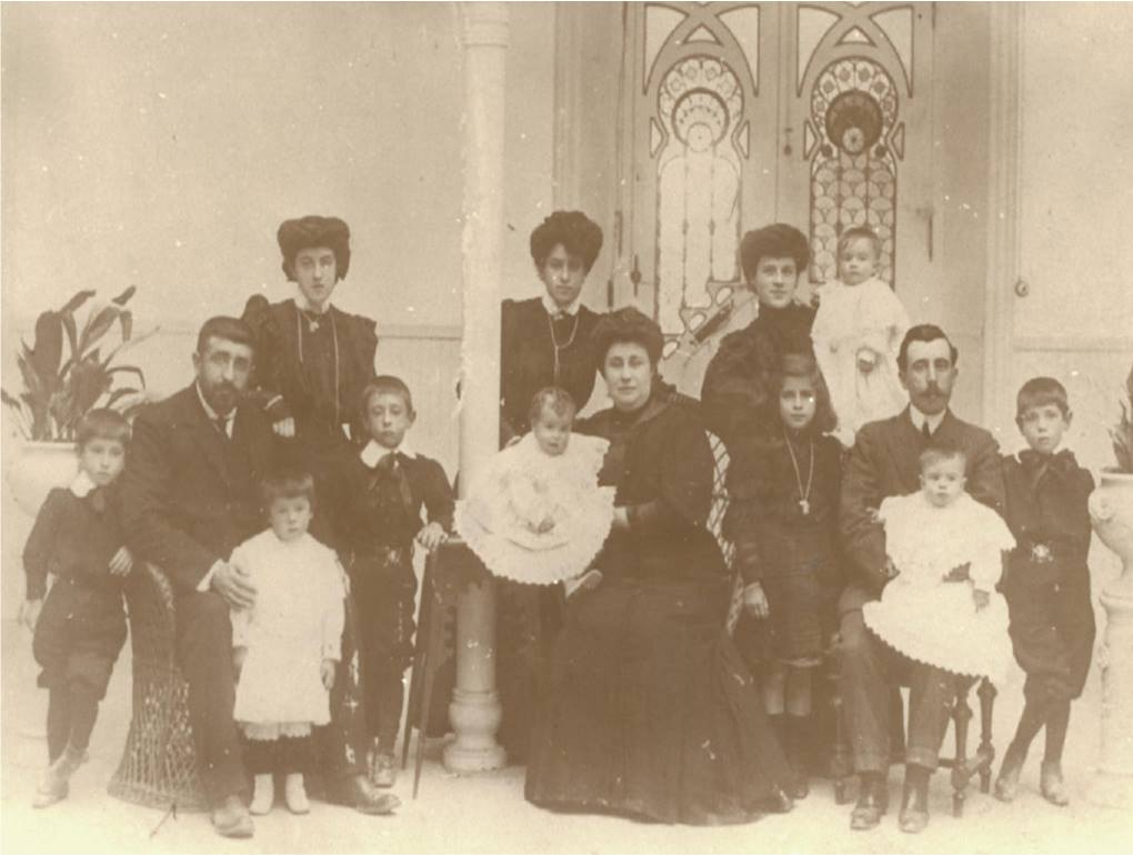 Familia de Oliverio Martínez Mier posando en el patio de su casa en Alcázar de San Juan. Detras de pie: Sus hijas Orfela, Eneda y Julia Martínez Gonzalez de la Fuente, y su nieta Carmen (en brazos). Delante Izquierda: Oliverio Martínez Mier, rodeado de sus hijos Oscar, Orlando y Osvaldo Martínez Lanzarote. En el centro: Su segunda mujer, Adelaida Lanzarote Gros, con su nieta Oliverina. A la derecha: Adelaida, marido de Julia Martínez Gonzalez de la Fuente con su hija Julia en brazos y al lado Oliverio.